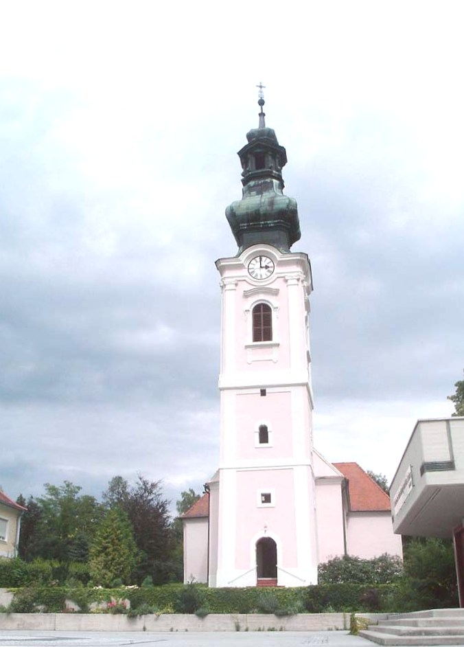 Church in Oberwart, Burgenland, Austria